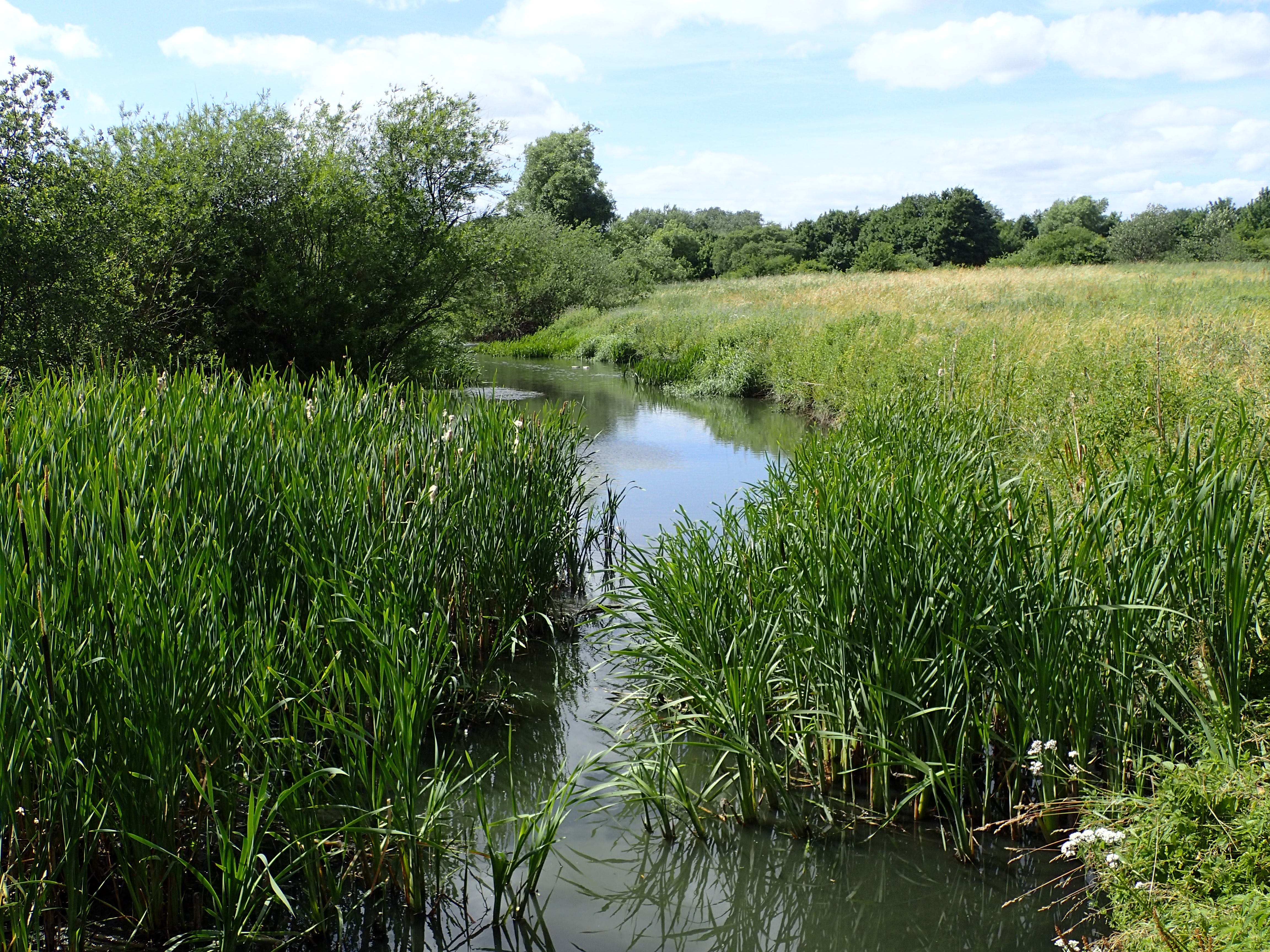 Døde Å, på Tyrseng ved Ormslevvej i Viby J.